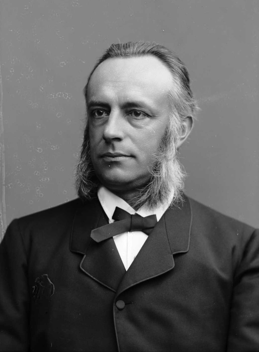 Christian Homann Schweigaard (1838–1899), høyesterettsadvokat og statsminister (H).